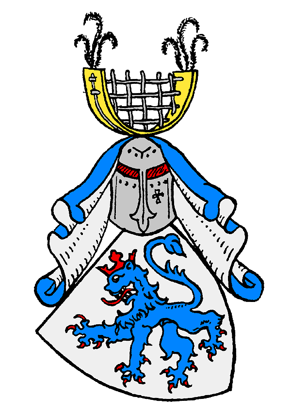 Wappen der Adelmann von Adelmannsfelden